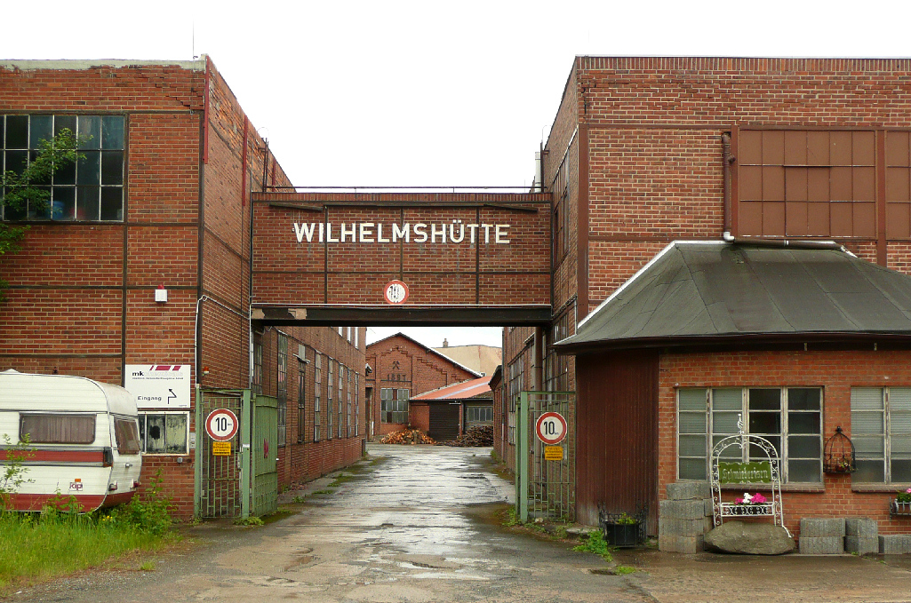 Eingang Wilhelmshütte